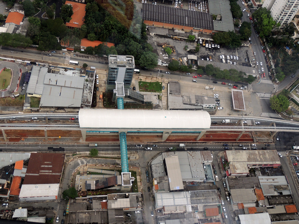 Estação Oratório da Linha 15 Prata do Metrô de São Paulo em obras. Junho de 2014.